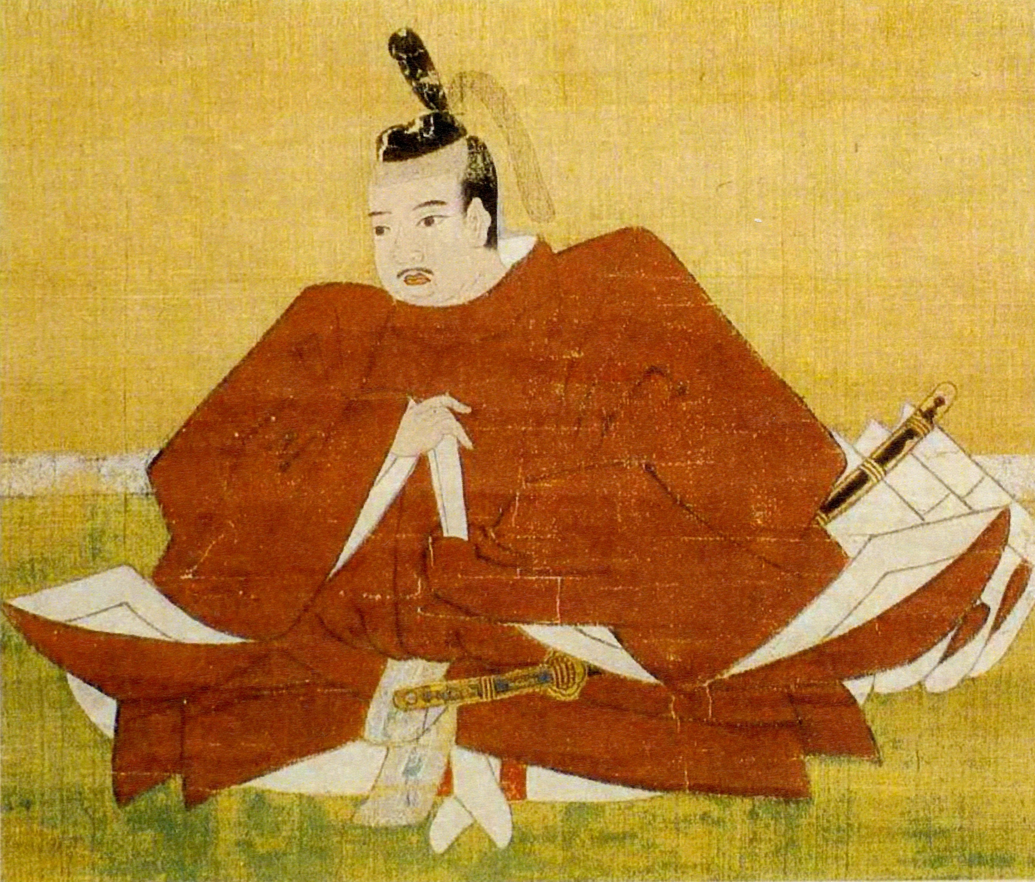 旗本津田氏の祖・織田秀敏の肖像画。